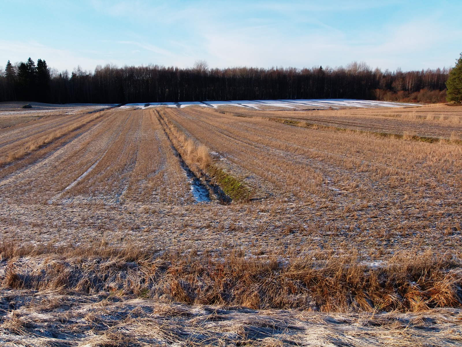 peltolohko, sarka ja sarkaojat